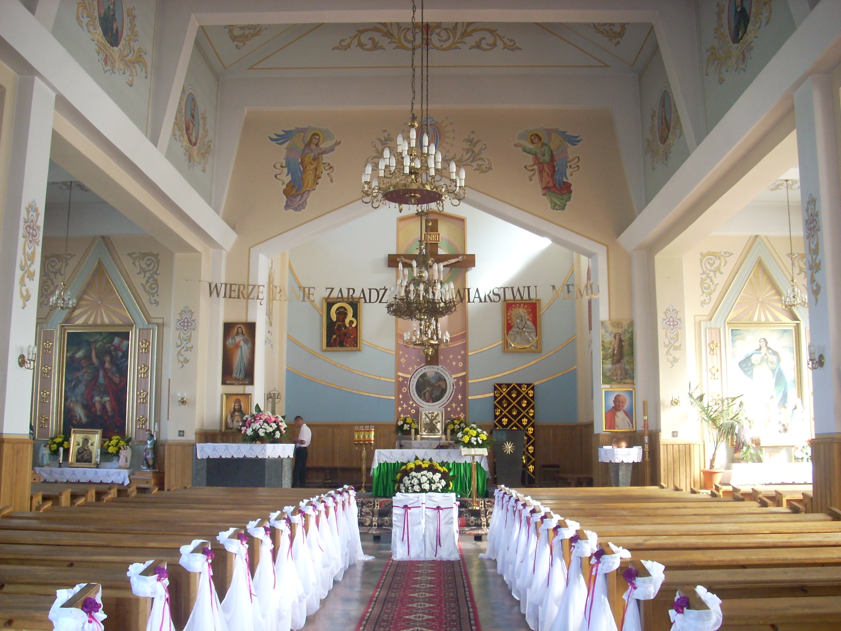 Wnętrze kościoła św. Floriana w Jednorożcu